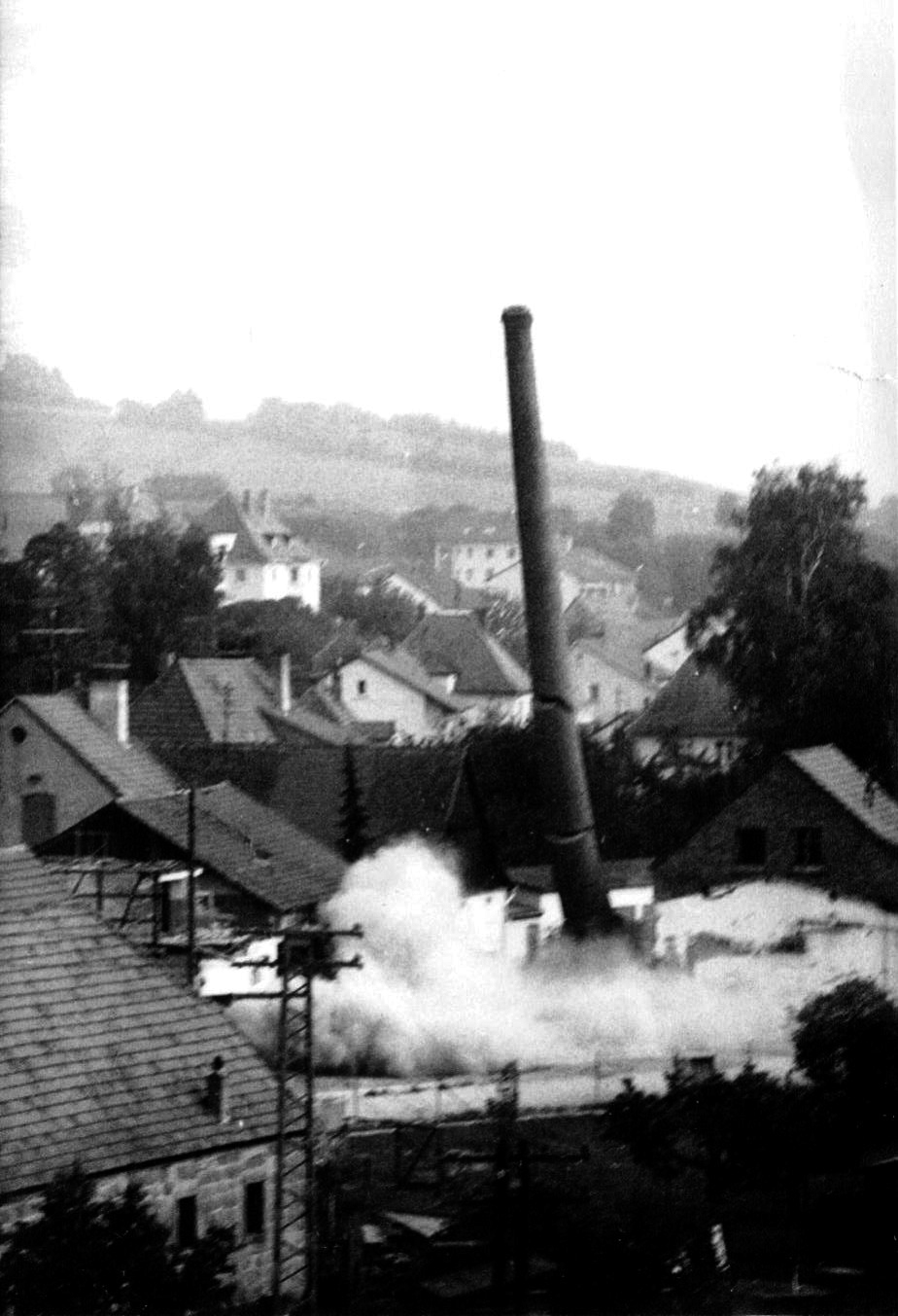 Die Sprengung des 28m hohen Fabrikschlots der Wurstfabrik Kraus in Burgkunstadt.